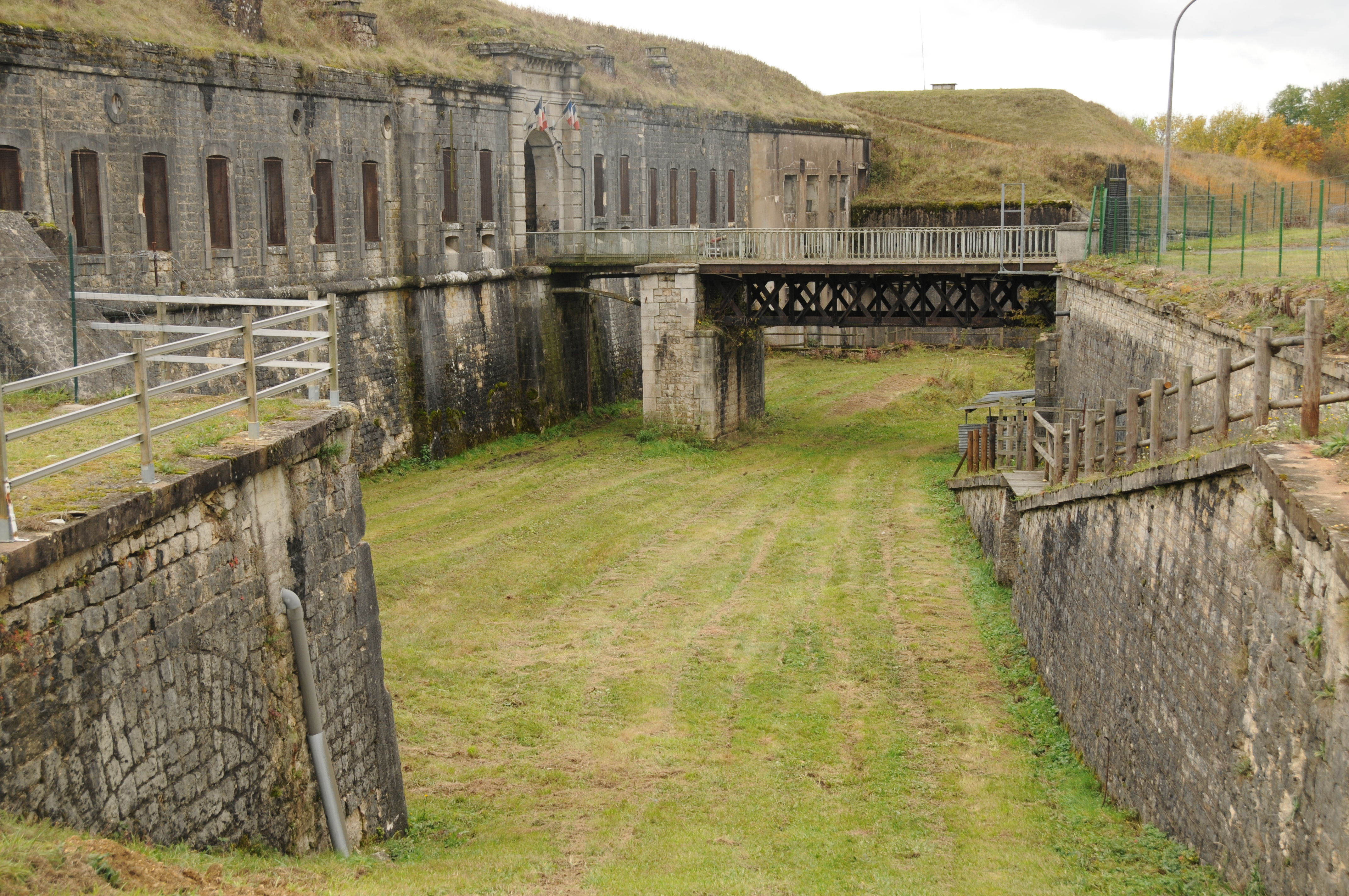 L'entrée principale. Vézelois fortifications.